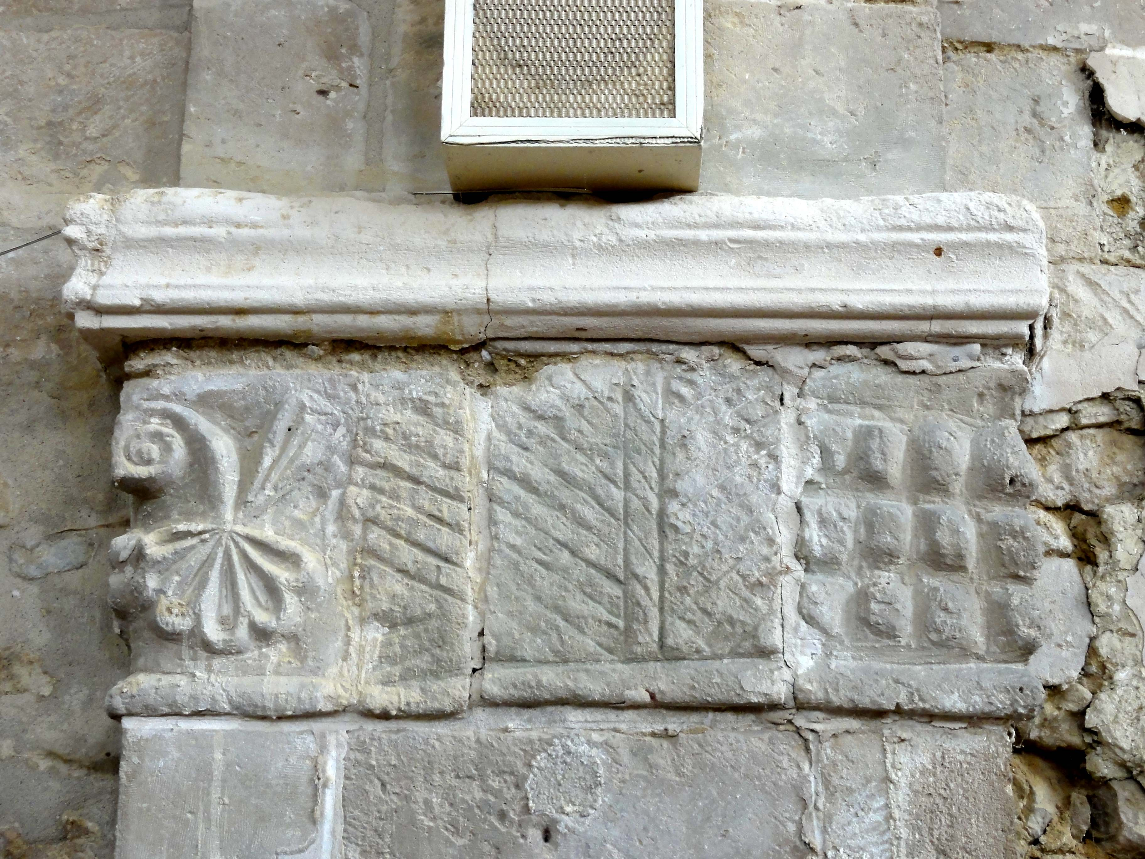 Chapiteau(x) de l'église ou cul-de-lampe - voir titre.